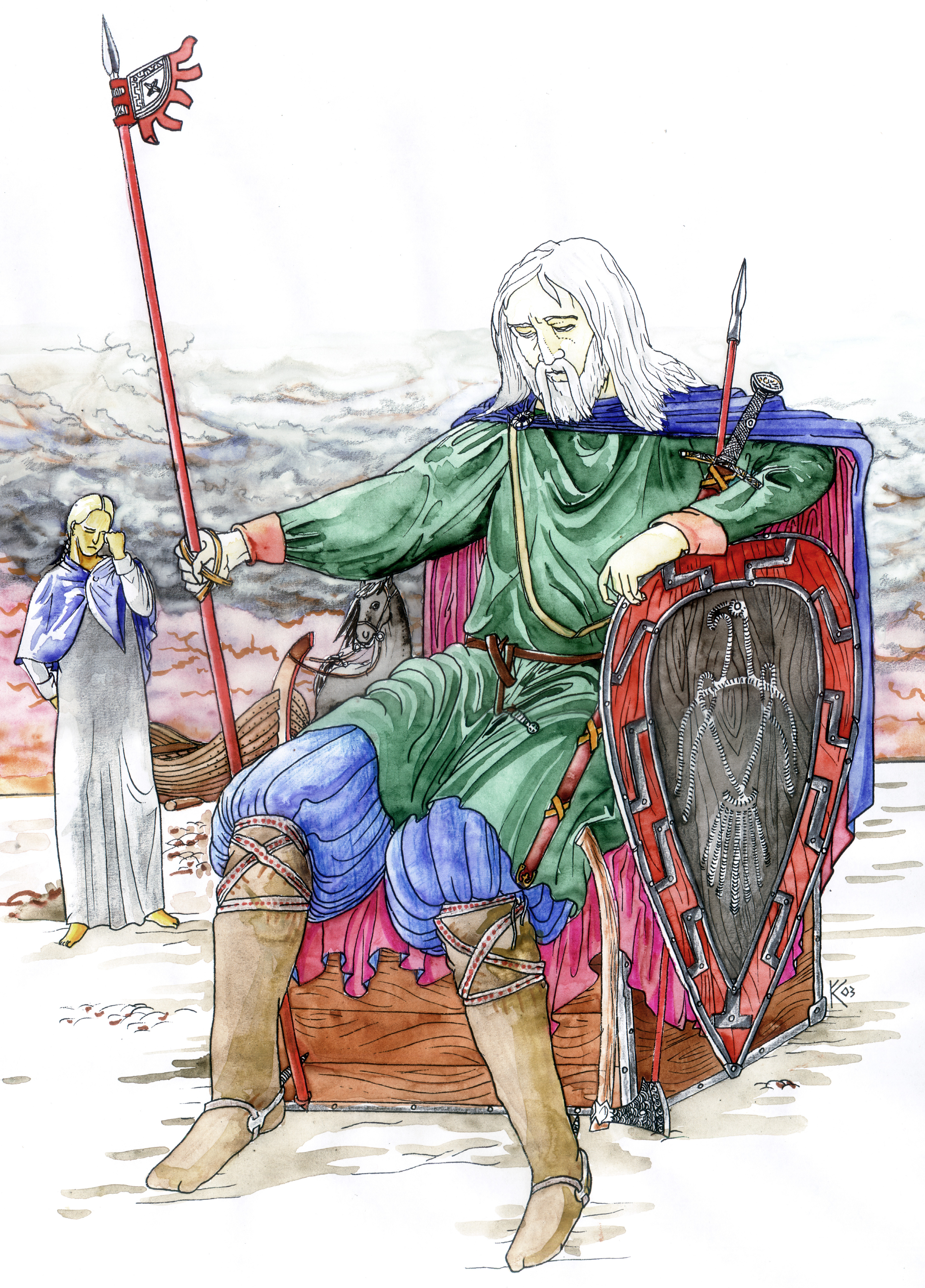 Убор дружинного князя сер. XI в., останки которого были найдены и реконструированы на могильнике Клинцовка-1 в 1977 г. Кулаковым Владимиром Ивановичем. Убор характерен для обитателей Янтарного берега